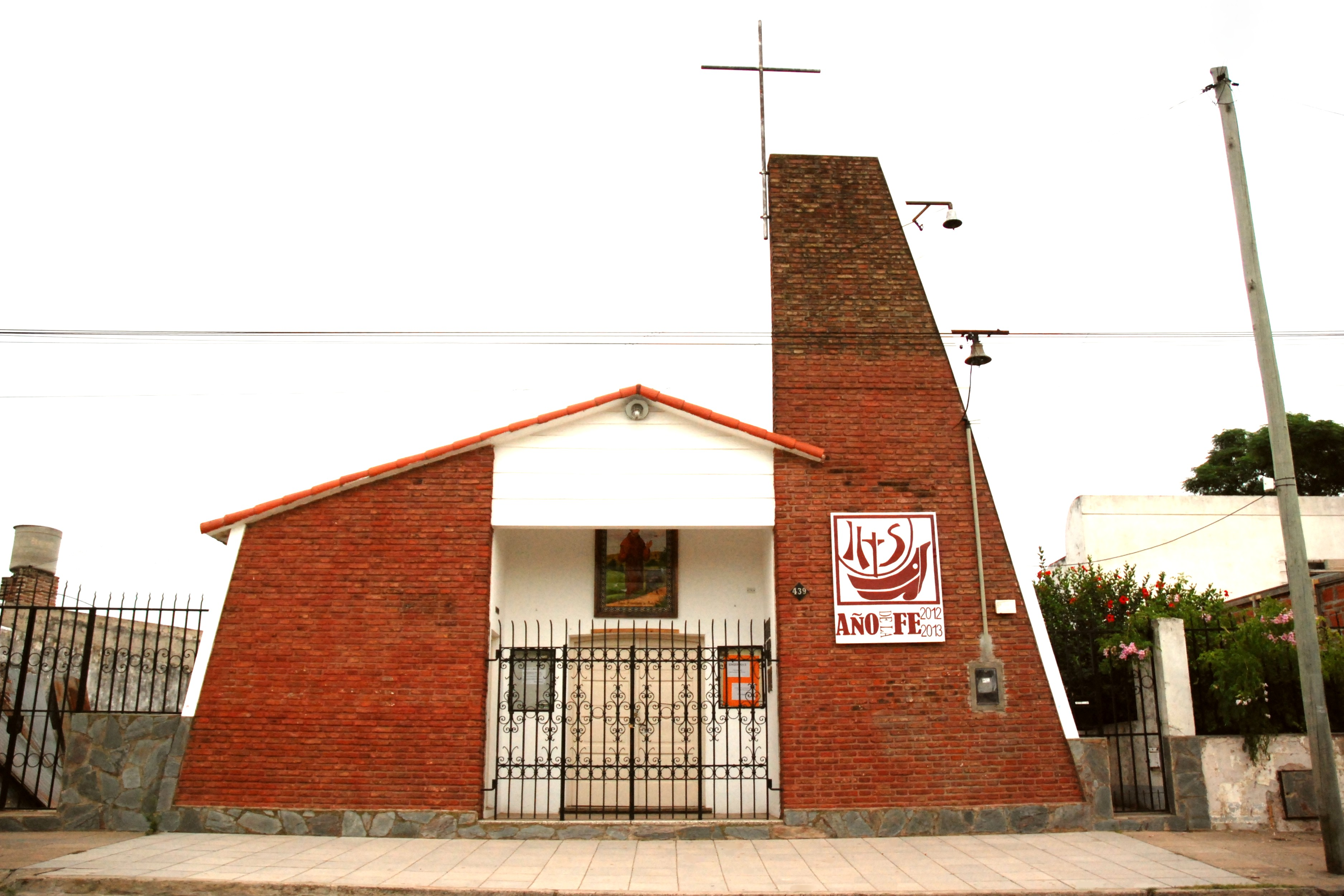 Iglesia San Francisco. Junín, Argentina.